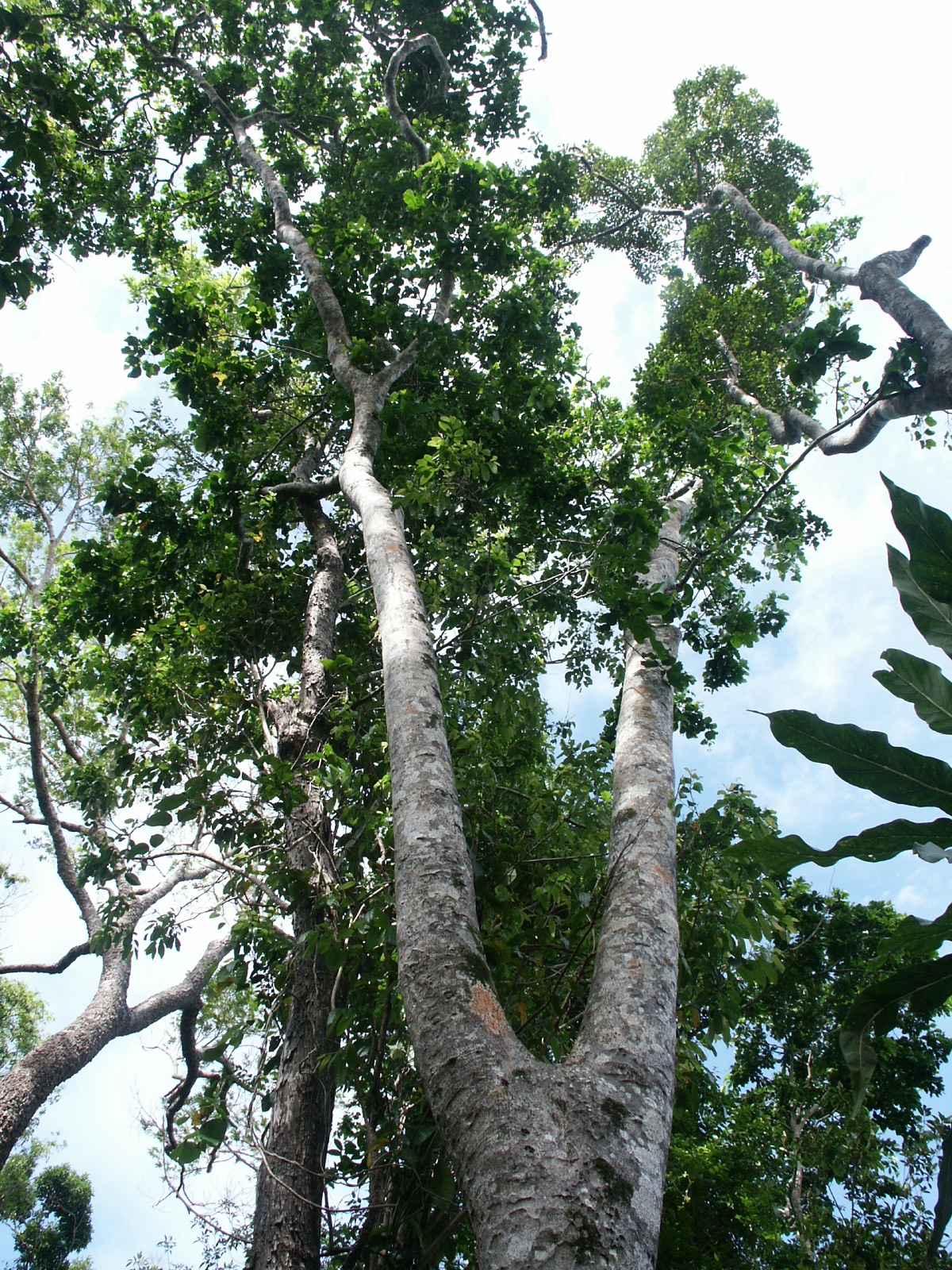 Intsia bijuga ou Kohu à l'Ile des Pins - Nouvelle-Calédonie